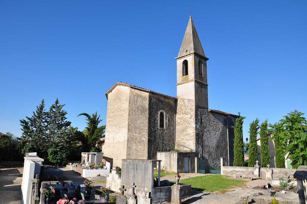 Thèze, église et cimetière